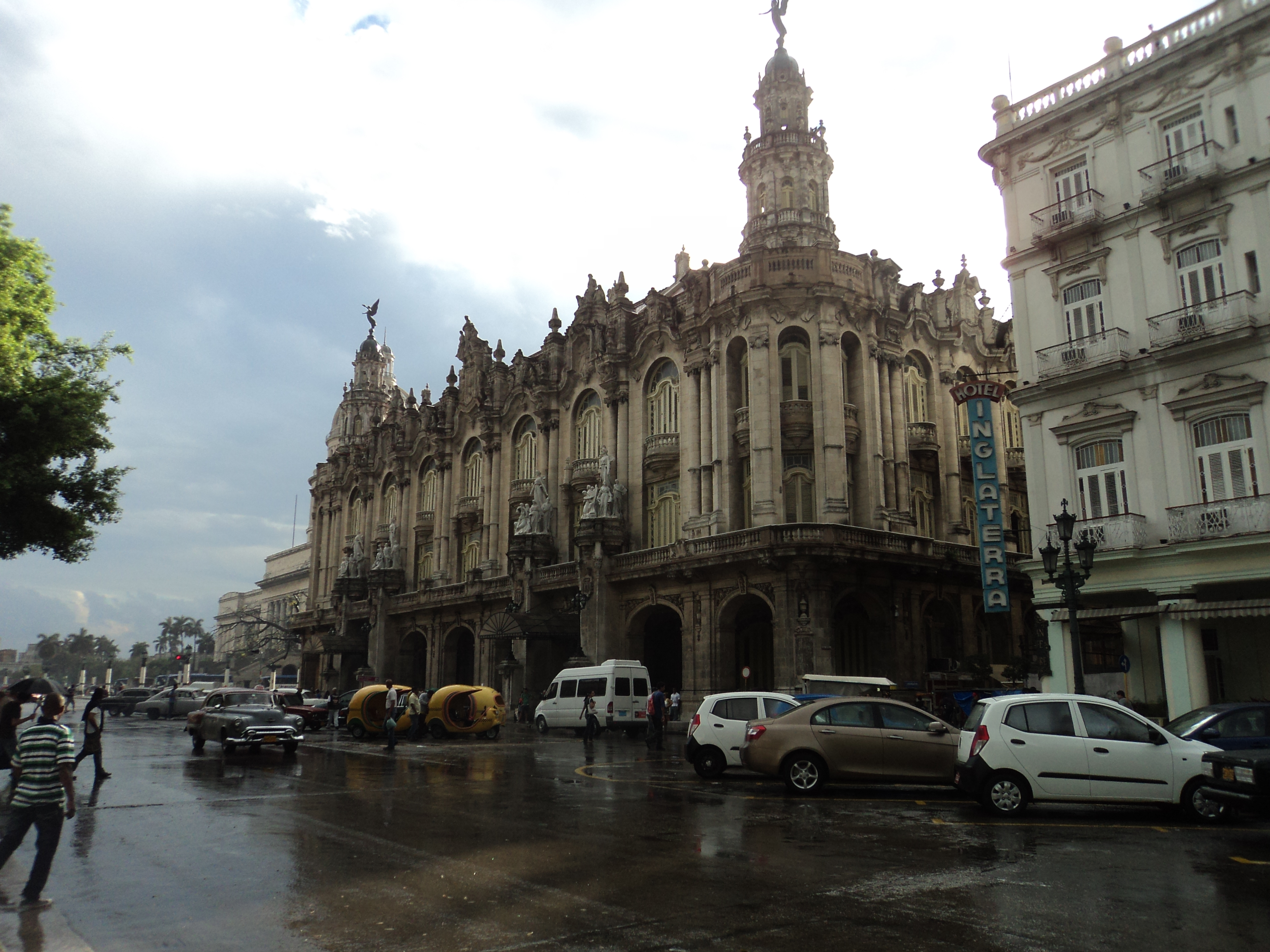 Habana vieja, centro histórico de la Habana